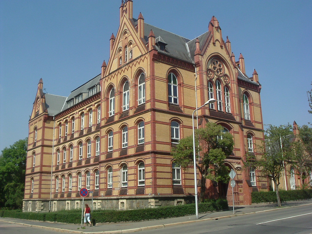 Zabelschule, Gera, Deutschland/Germany